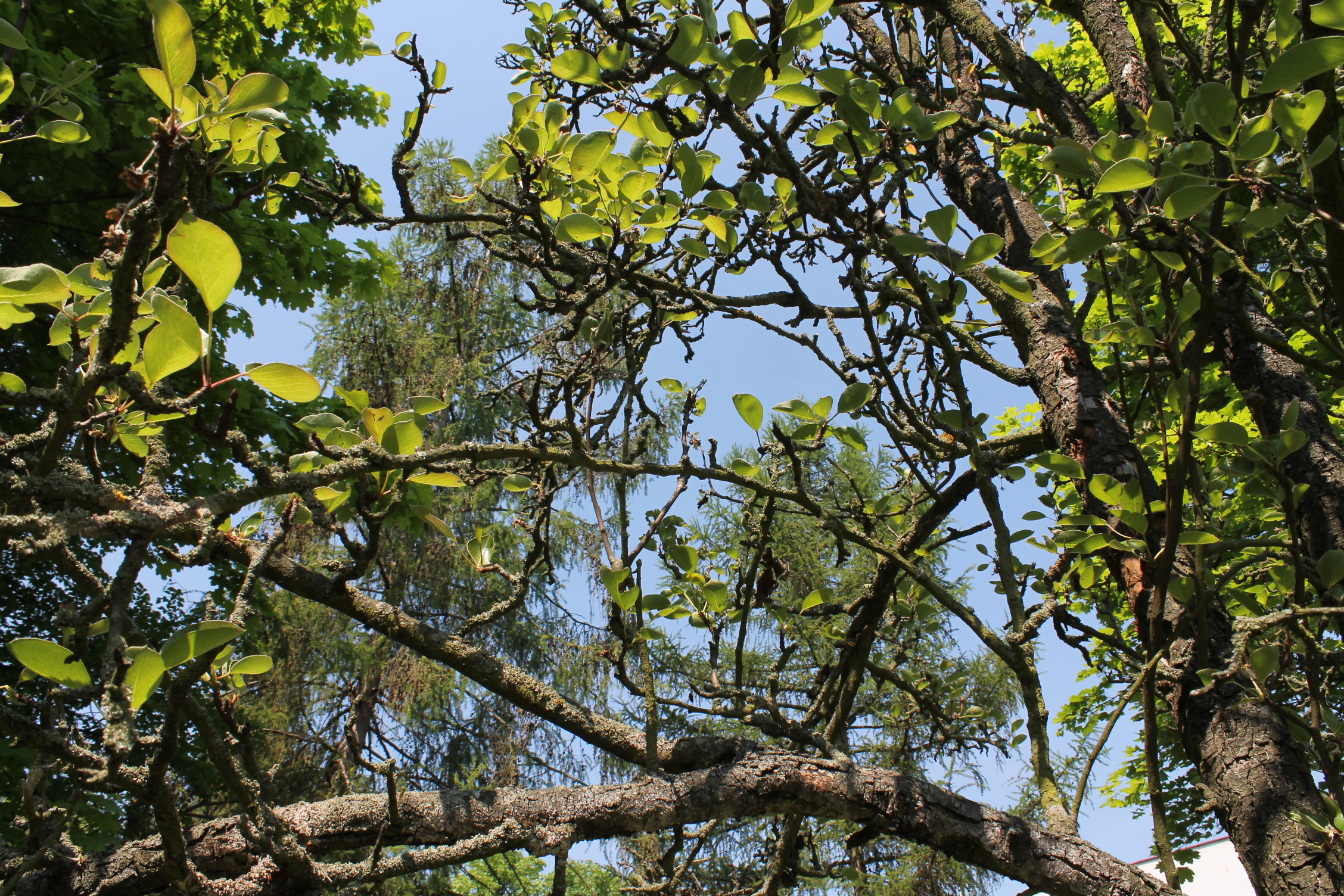 Hrušeň, zavětvení , Brno Komín